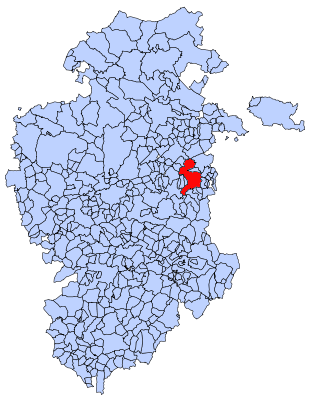 Belorado en Burgos